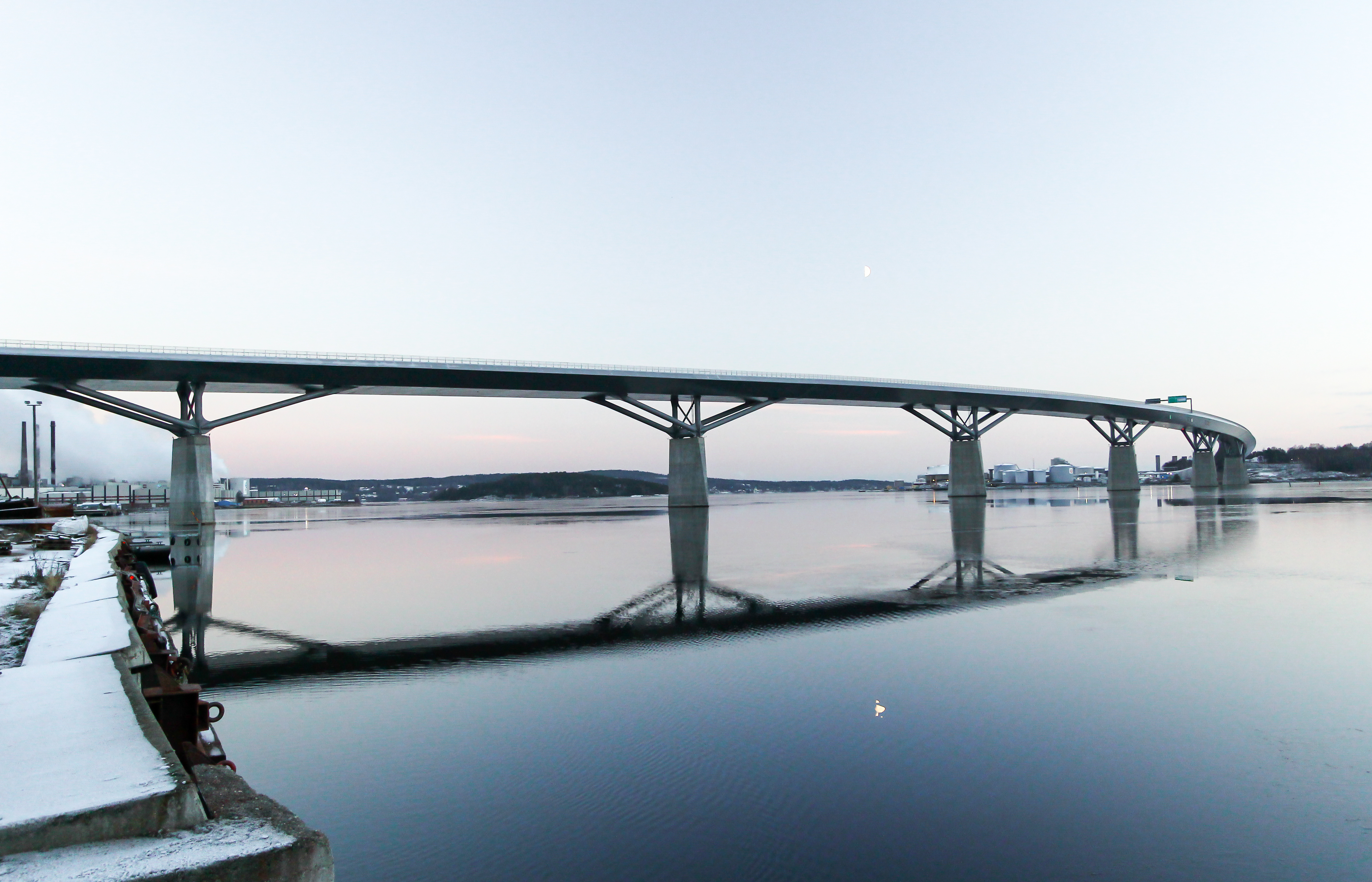 Sundsvallsbron sett från norra brofästet, november 2014